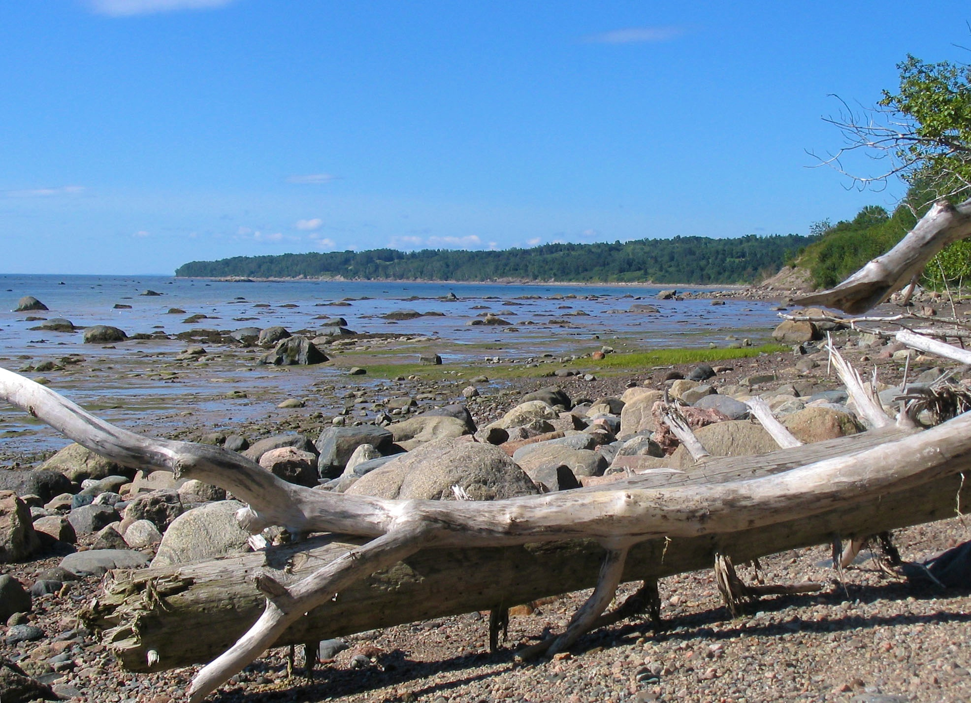 Aperçu de la baie de Bon-Désir